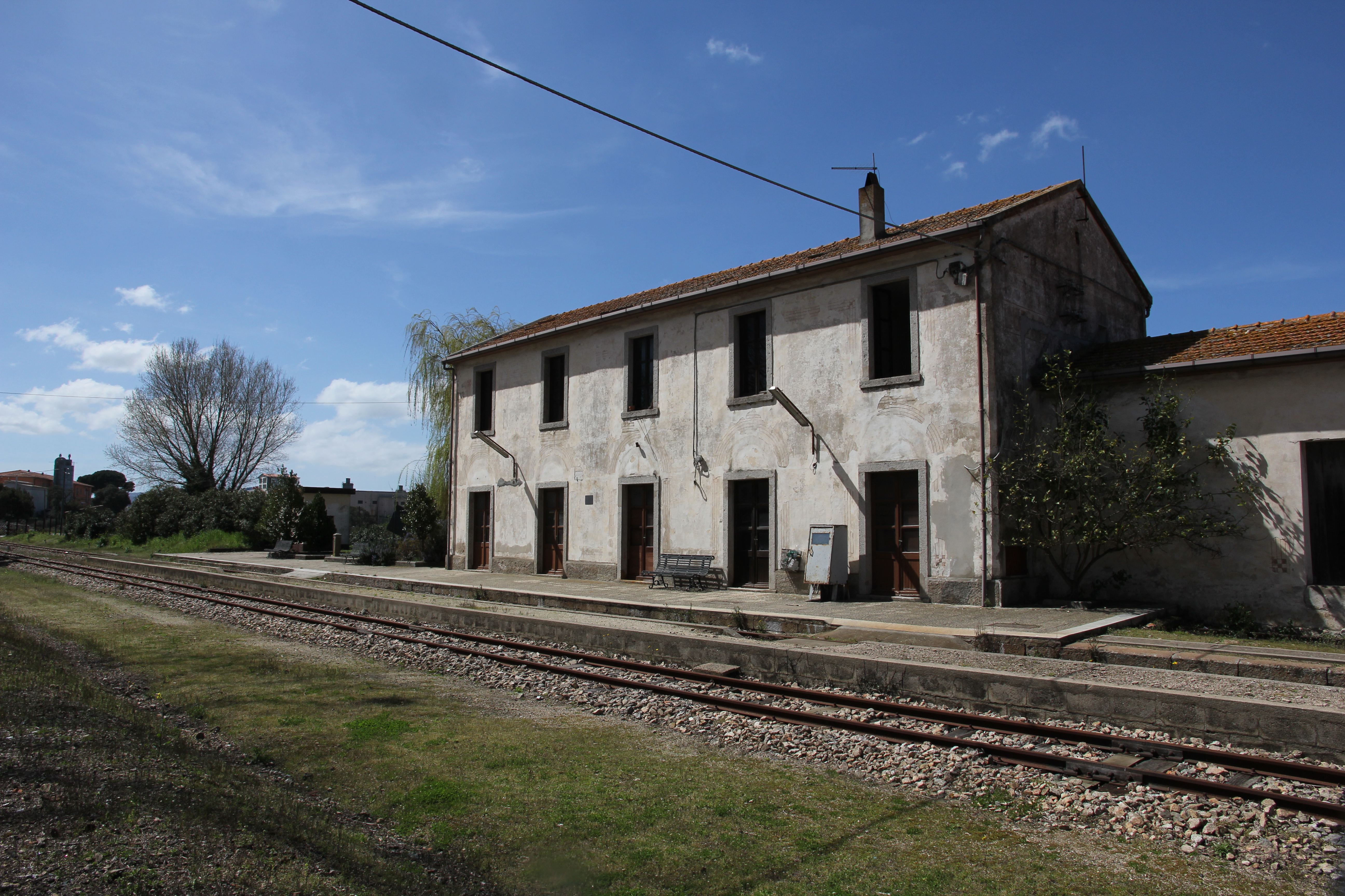 Ferrovia Sassari-Tempio-Palau. Stazione ferroviaria di Luras (comune di Calangianus).